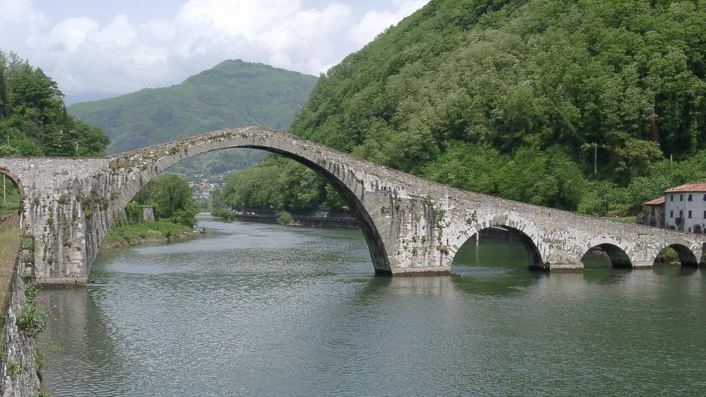 Ponte della Maddalena, Provinz Lucca, Italien